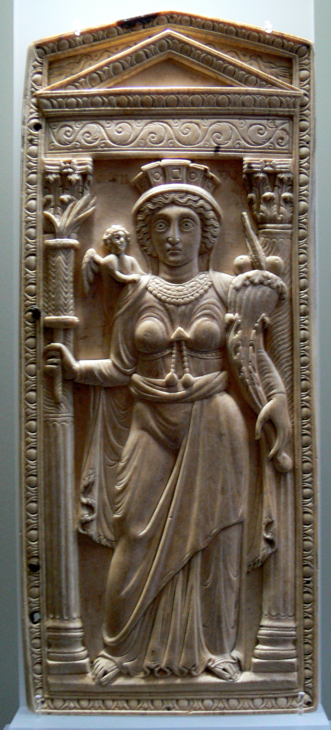 Wien, Kunsthistorisches Museum, Antikensammlung, Relief "Constantinopolis", byzantinisch, Ende. 5./Anfang 6. Jh. n. Chr., Inv. Nr. X 38